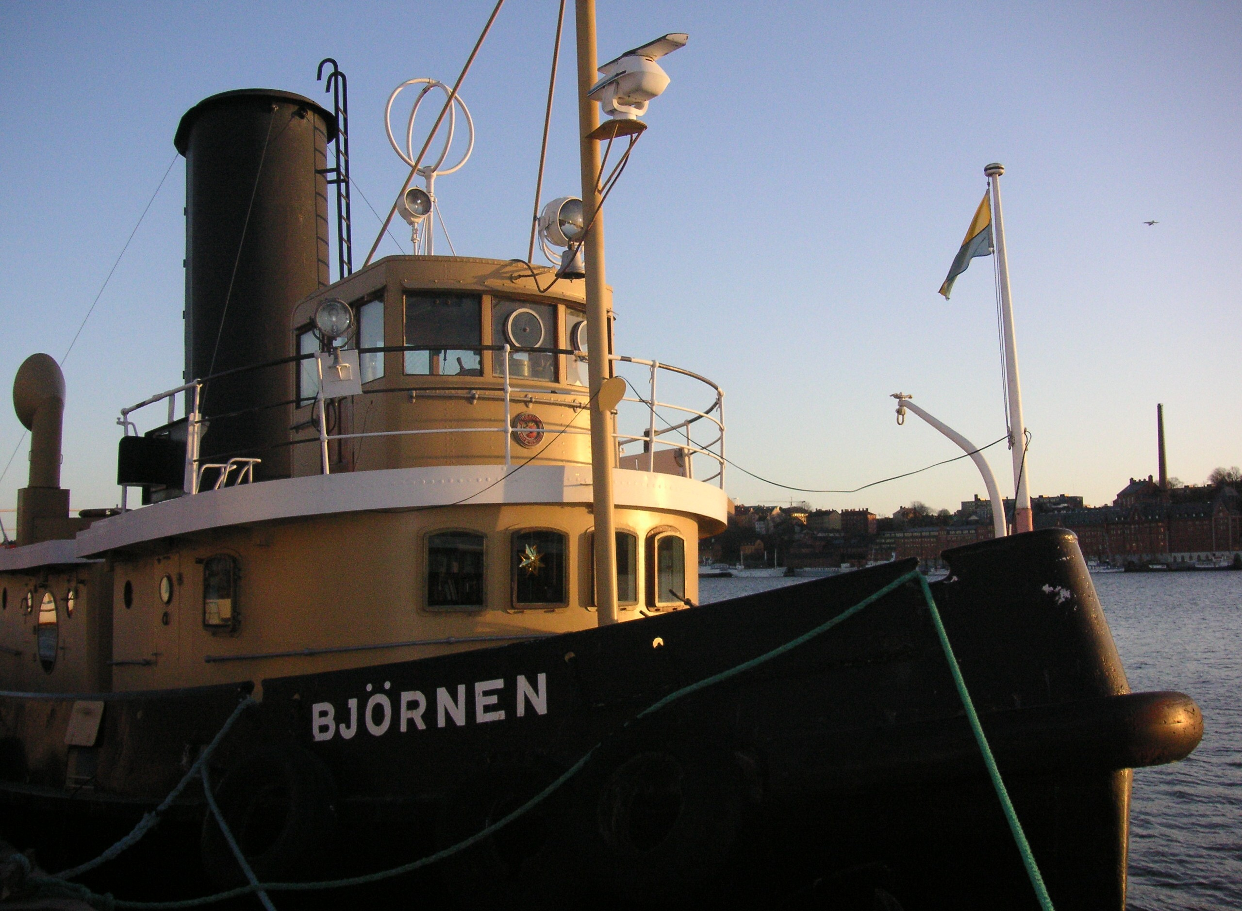 Bogserbåten S/S Björnen vid Norr Mälarstrand 2006 This is an image of the protected Swedish ship Björnen, with call sign SGHD .